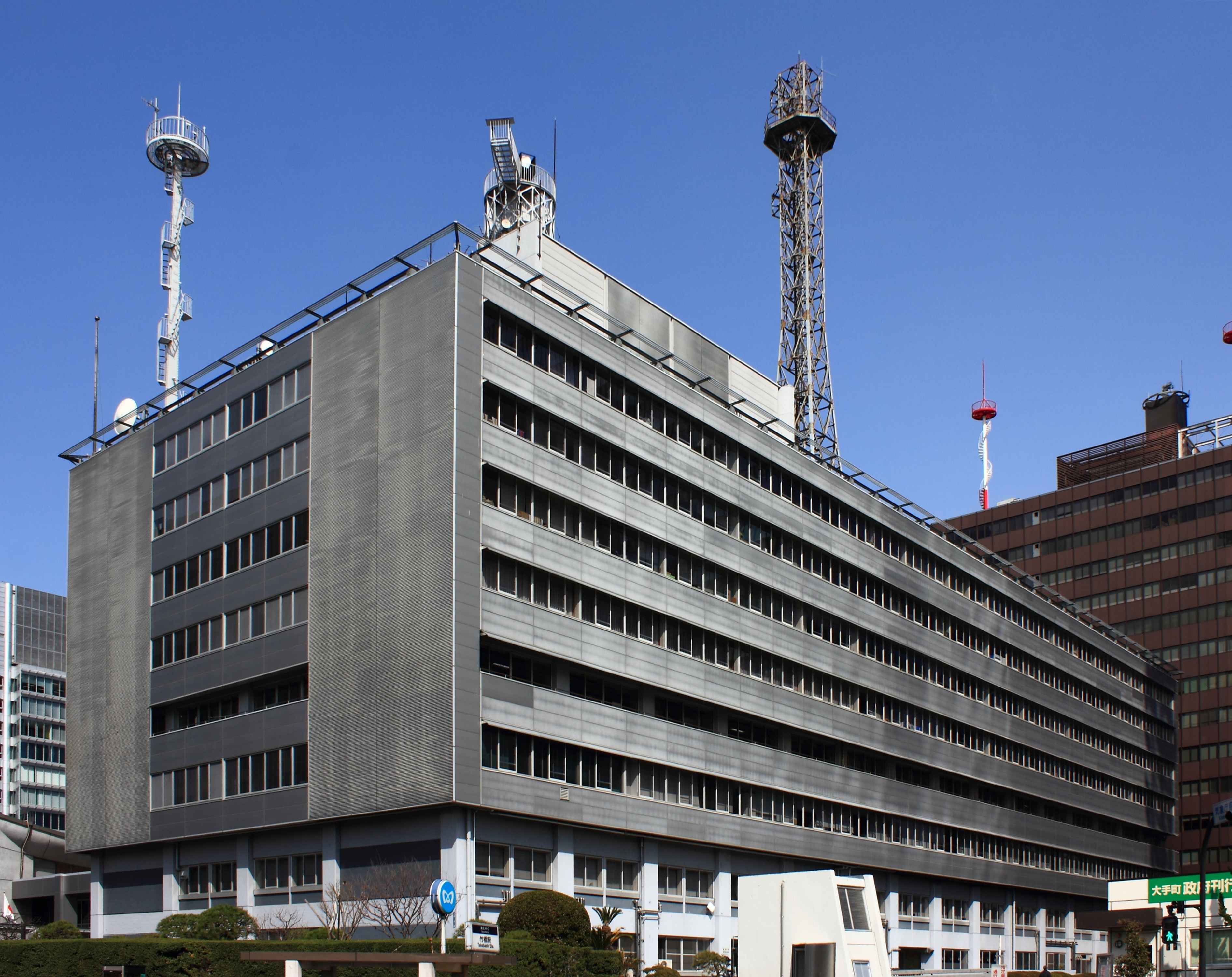 気象庁（東京都千代田区）